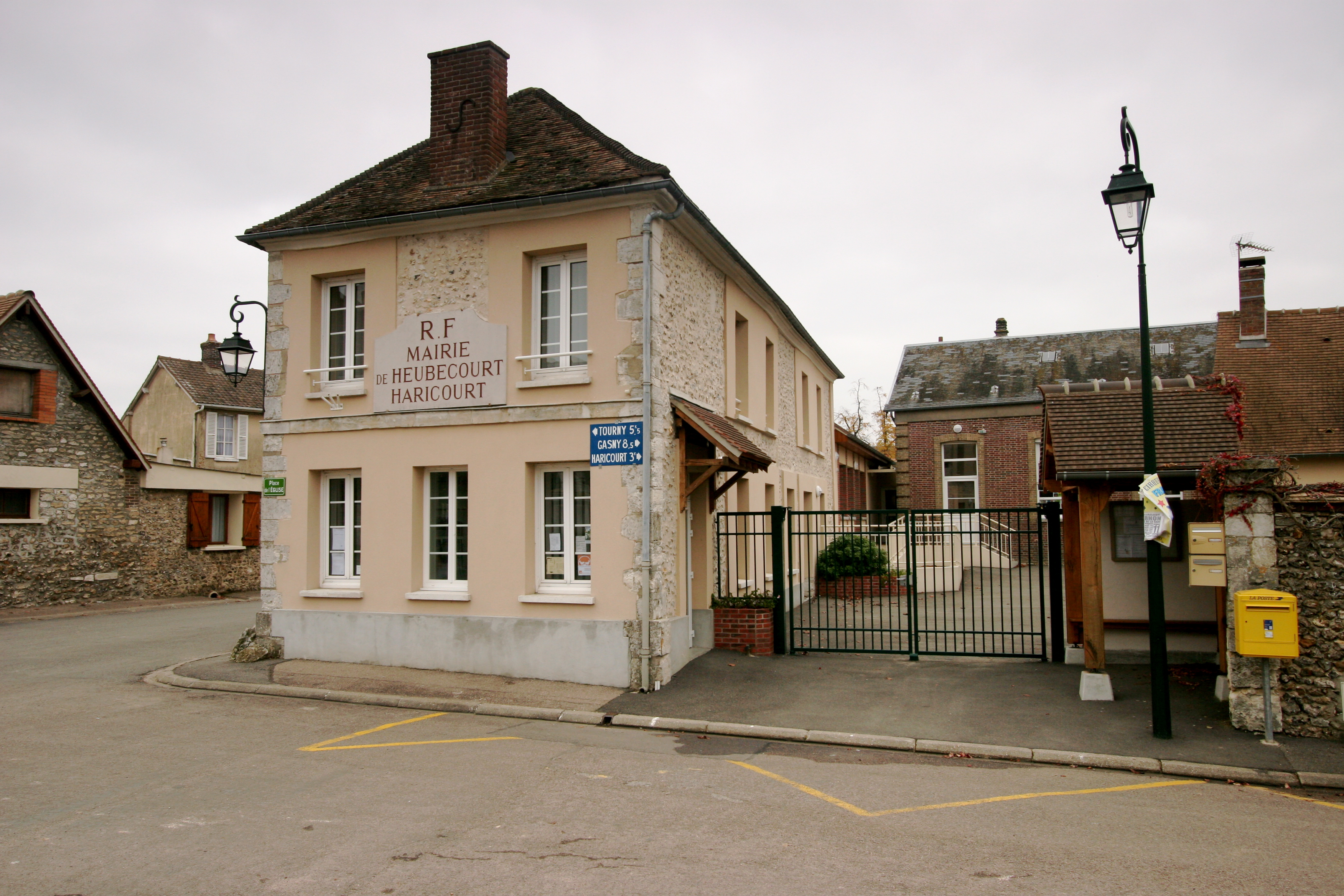 Mairie d'Heubécourt-Haricourt, Eure, France